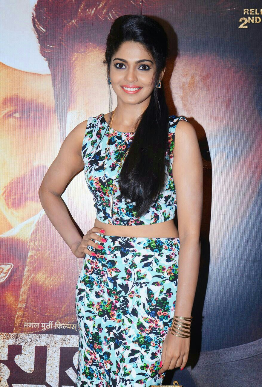 Pooja Sawant at premier